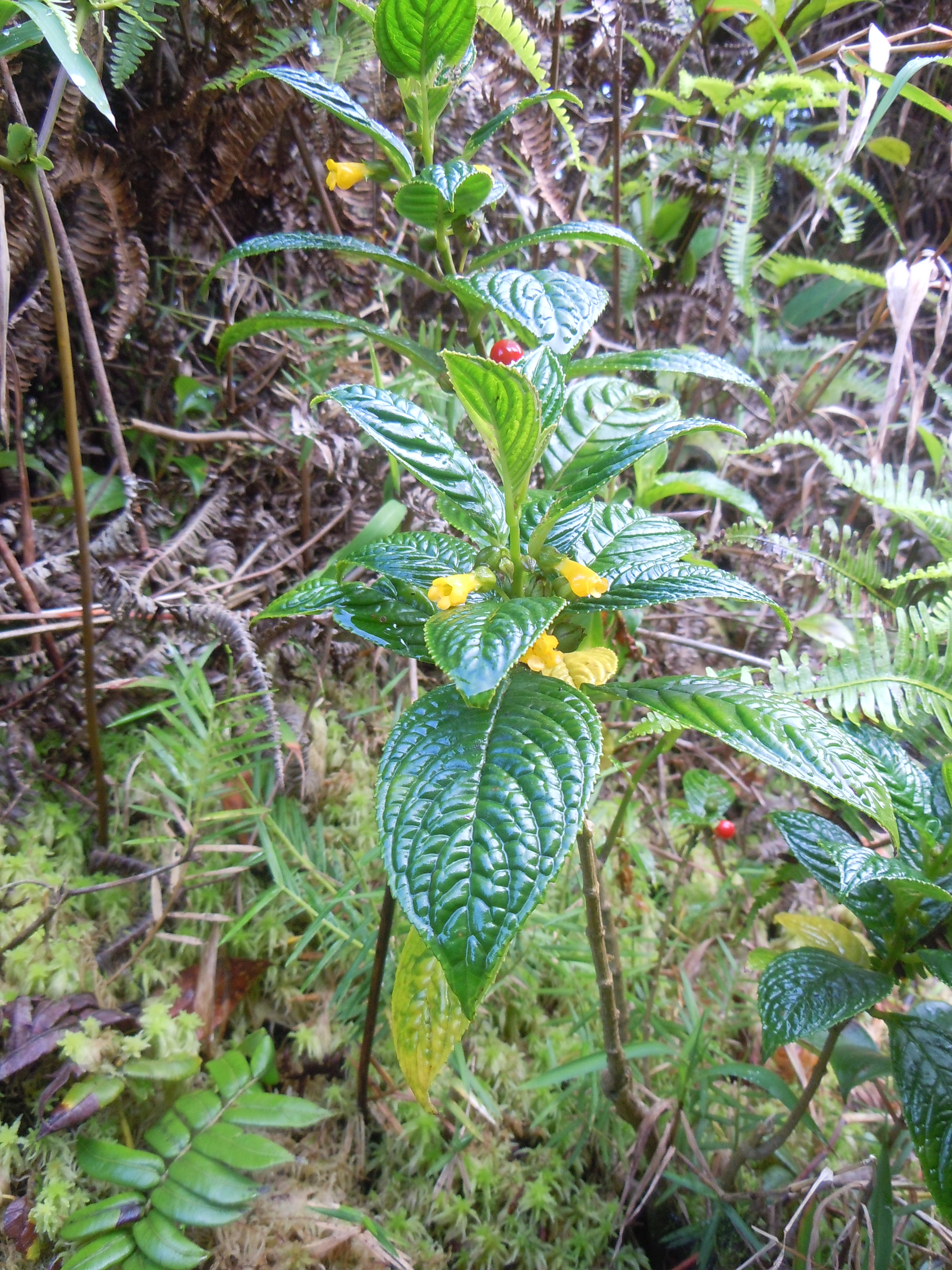 Besleria lutea-La Soufrière-Guadeloupe